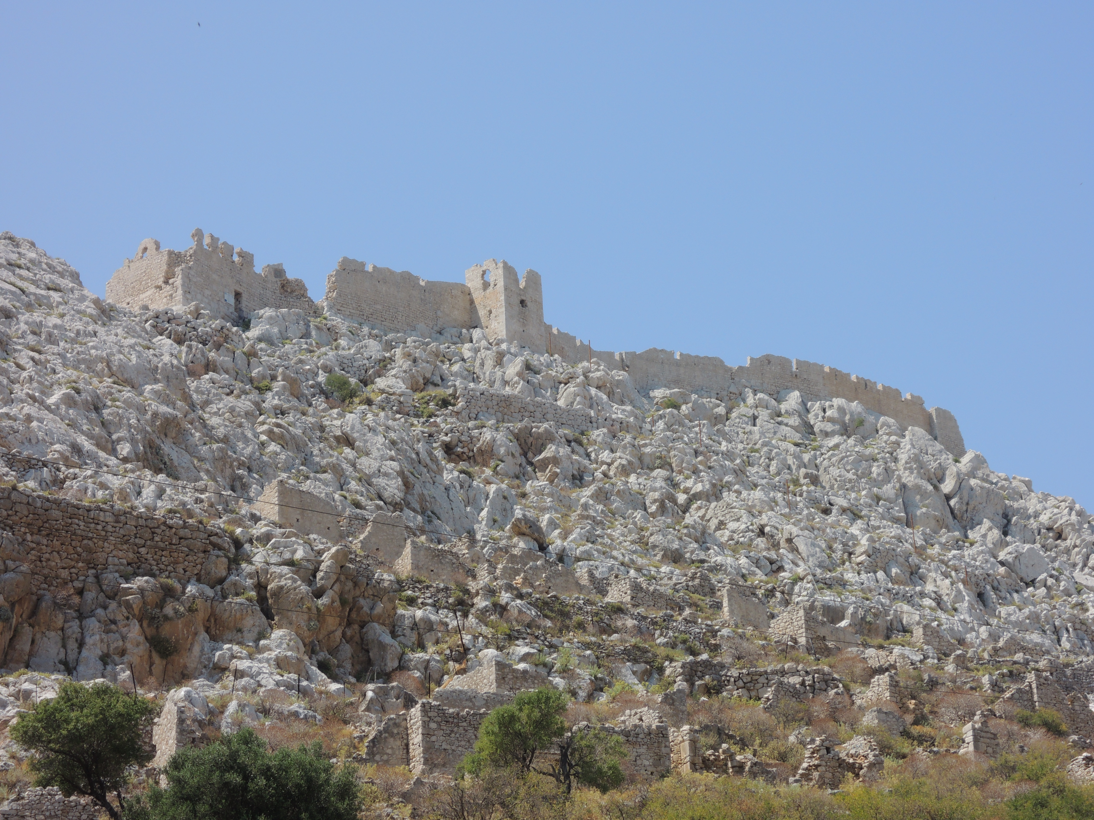 Халки. Вид на крепость